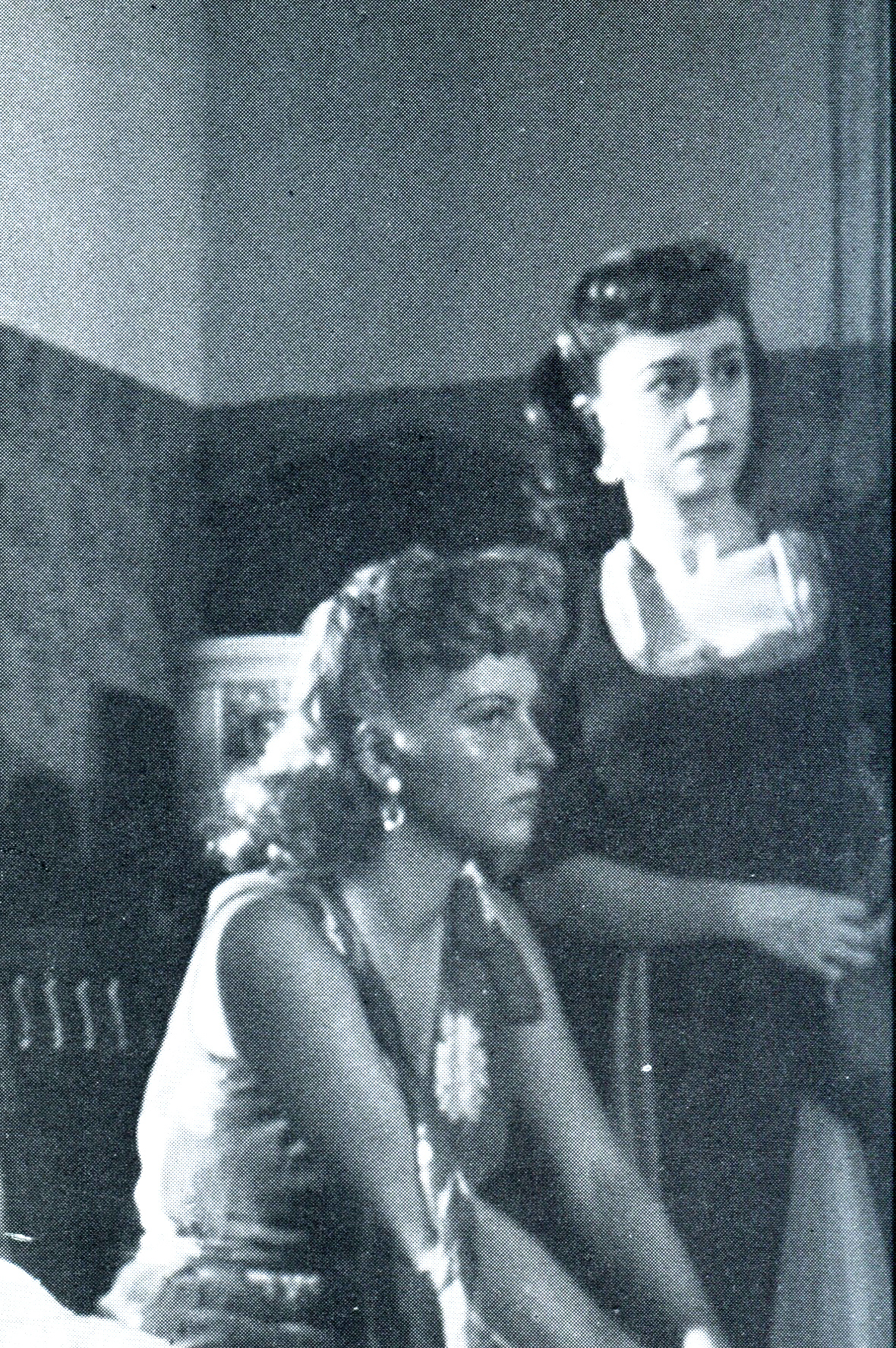 Carla Del Poggio e Giulietta Masina in "Senza pietà" (Lattuada, 1948)